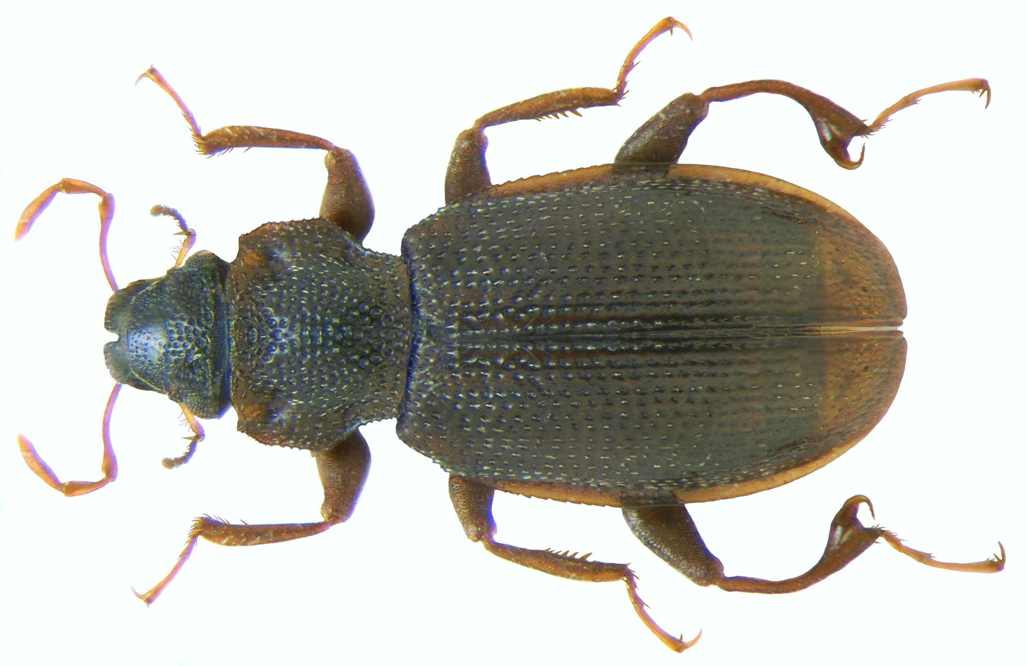 Familie: Hydraenidae Groesse: 2,92 mm Fundort: Nepal, Mahakali District, Darchula,Ghusa, 2300 m leg. A.Weigel, 2005; det. A.Skale, 2005 Foto: U.Schmidt, 2008